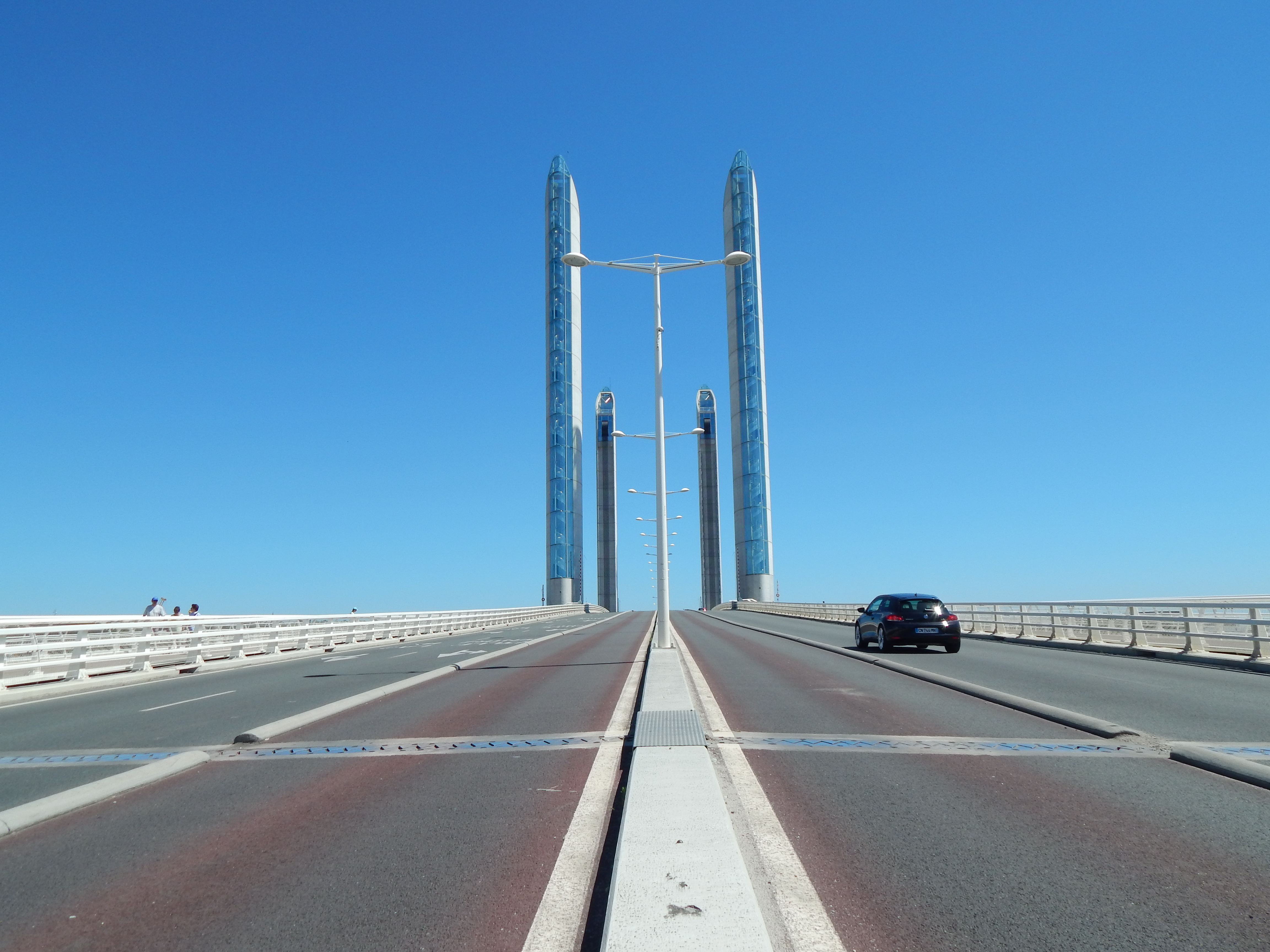 Le pont Jacques Chaban Delmas est d'une belle élégance.